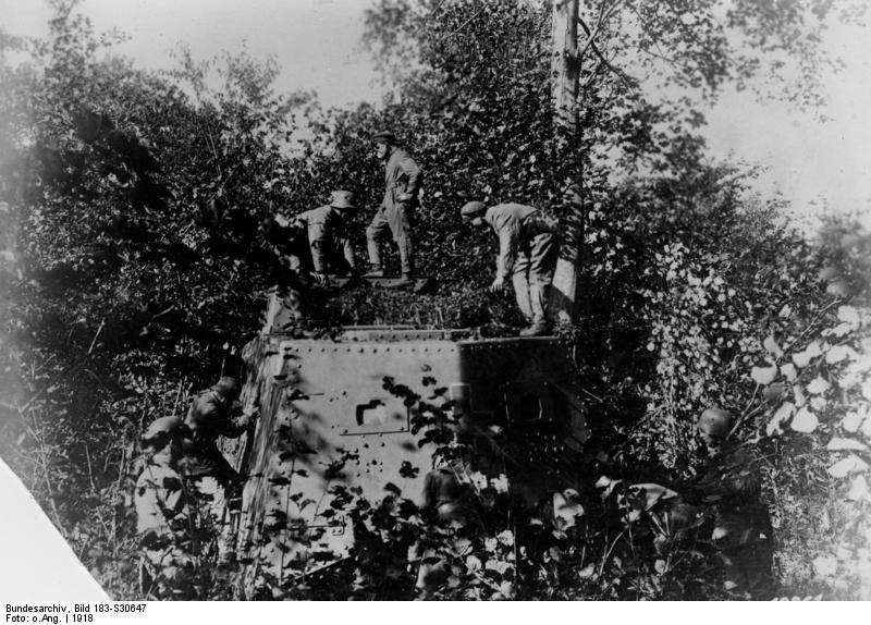 Westfront, Tarnung eines deutschen Panzers Scherl: Weltkrieg 1918 Von den Kämpfen an der Westfront. Deutscher Tank wird gegen Fliegersicht gedeckt. 10105-18